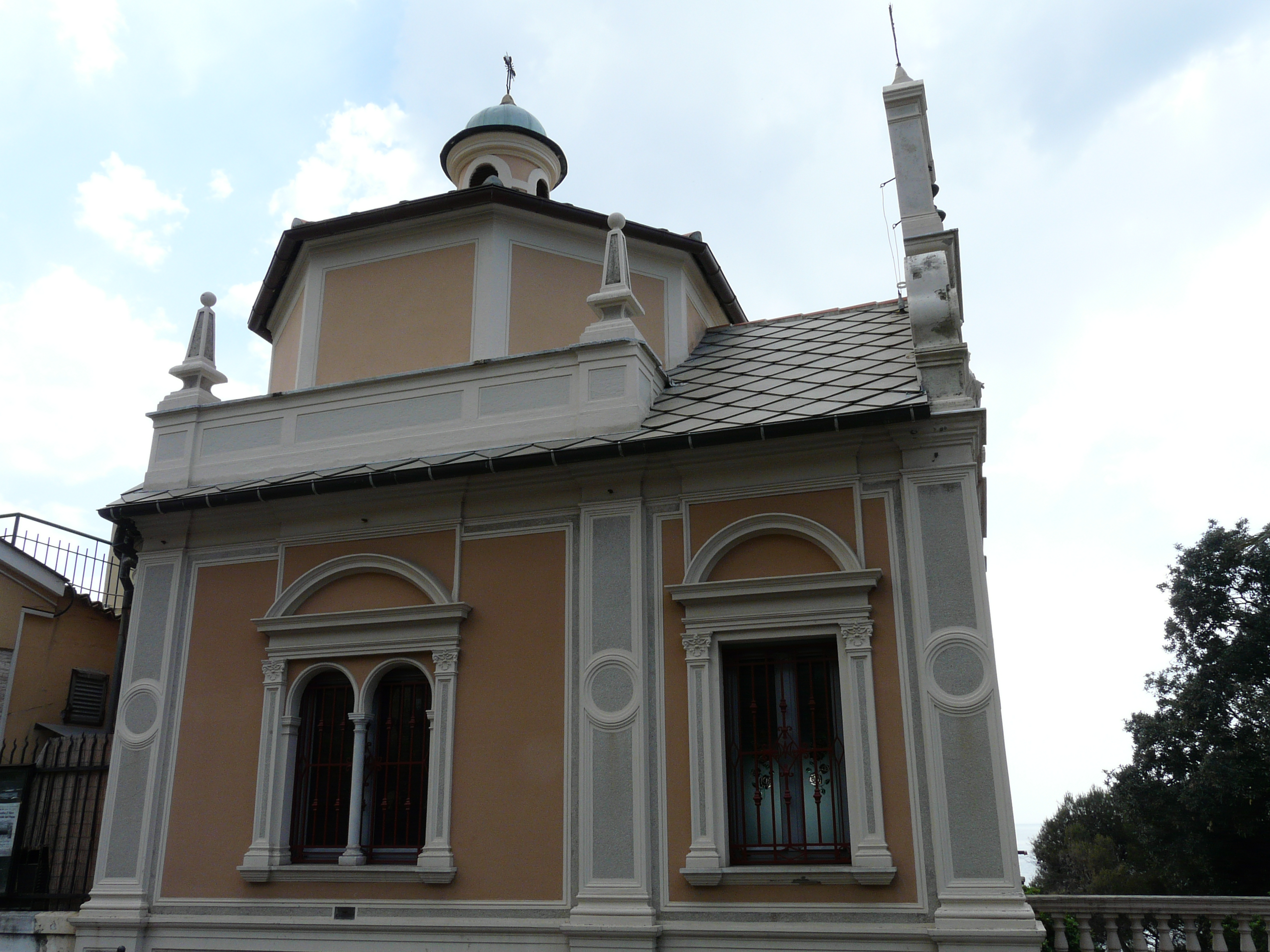 Santuario di Nostra Signora delle Grazie, Bogliasco, Liguria, Italia